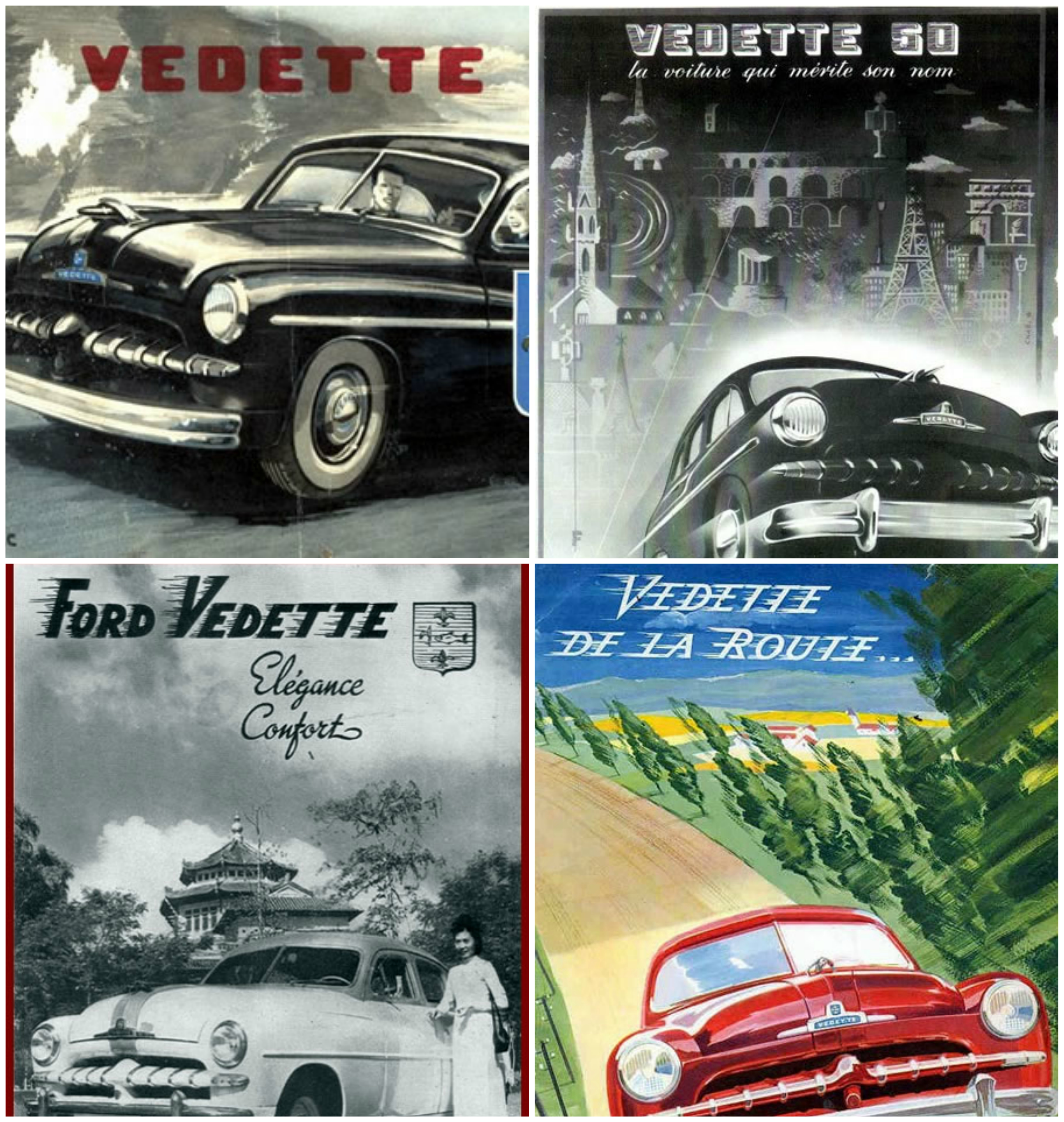 Propagandas do Ford Vedette no período de sua produção.